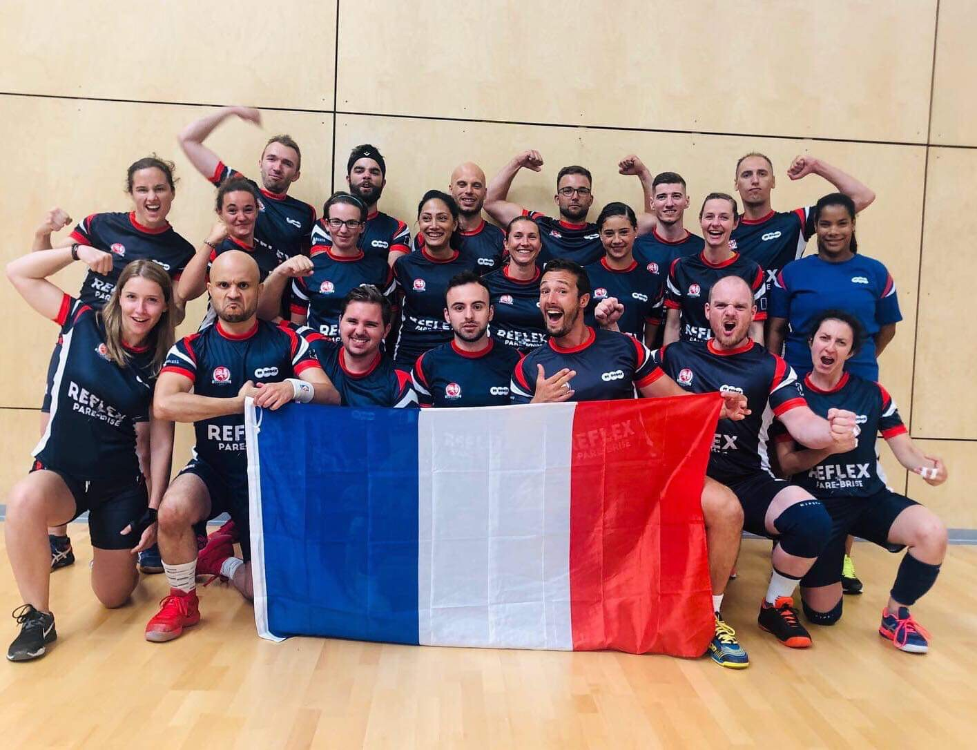 Equipe de France Dodgeball 2019 Newcastle